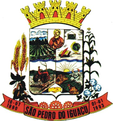 Brasão de Armas do município paranaense de São Pedro do Iguaçu.